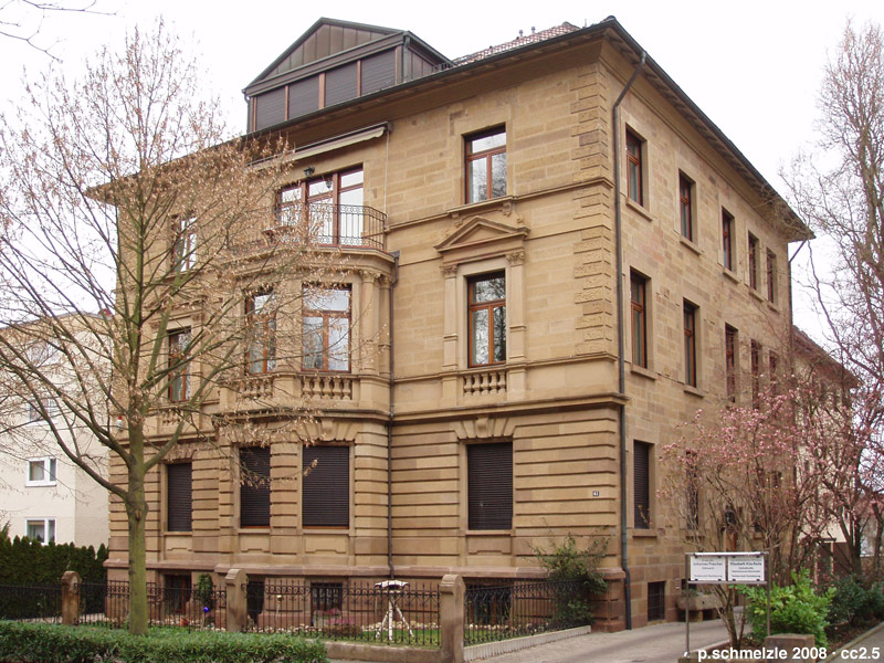 Denkmalgeschütztes Gebäude in der Bismarckstr. 61 in Heilbronn